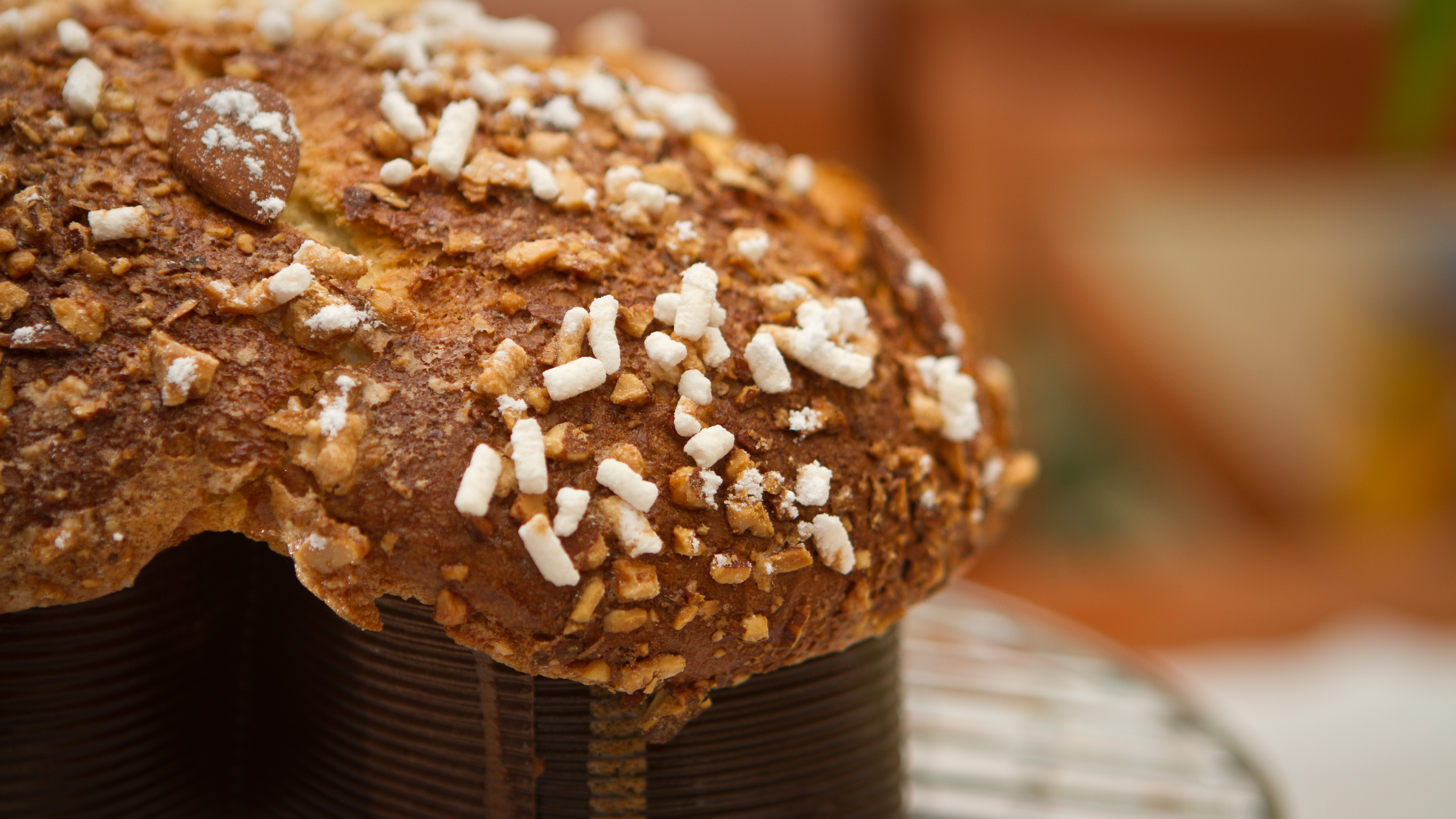 Colomba Pasquale ("Easter Dove" in English) or Colomba di Pasqua is an Easter counterpart of the two well-known Italian Christmas desserts, panettone and pandoro. The dough for the Colomba is made in a similar manner to panettone, with flour, eggs, sugar, natural yeast and butter; unlike panettone, it usually contains candied peel and no raisins. The dough is then fashioned into a dove shape (colomba in Italian) and finally is topped with pearl sugar and almonds before being baked. The Colomba di Pasqua was commercialised by the Milanese baker and businessman Angelo Motta as an Easter version of the Christmas speciality panettone that Motta foods were producing. -- A Milano, Pavia e dintorni vi è una suggestiva leggenda che viene tramandata insieme ad un'antica usanza di consumare a Pasqua una colomba di pane dolce in onore e ricordo di San Colombano. Si narra che al suo arrivo in città, attorno al 612, l'abate irlandese venne ricevuto dai sovrani longobardi e invitato con i suoi monaci ad un suntuoso pranzo. Gli furono serviti numerose vivande con molta selvaggina rosolata, ma Colombano ed i suoi, benché non fosse di venerdì, rifiutarono quelle carni troppo ricche servite in un periodo di precetto quale quello pasquale. La regina Teodolinda si offese non capendo, ma l'abate superò con diplomazia l'incresciosa situazione affermando che essi avrebbero consumato le carni solo dopo averle benedette. Colombano alzò la mano destra in segno di croce e le pietanze si trasformarono in candide colombe di pane bianche, come le loro tuniche monastiche. Il prodigio colpì molto la regina che comprese la santità dell'abate e che poi decise di donare il territorio di Bobbio dove nacque l'Abbazia di San Colombano, ma questa fu un'altra storia. Però la colomba bianca divenne anche il simbolo iconografico del santo, ed è sempre raffigurata sulla sua spalla.